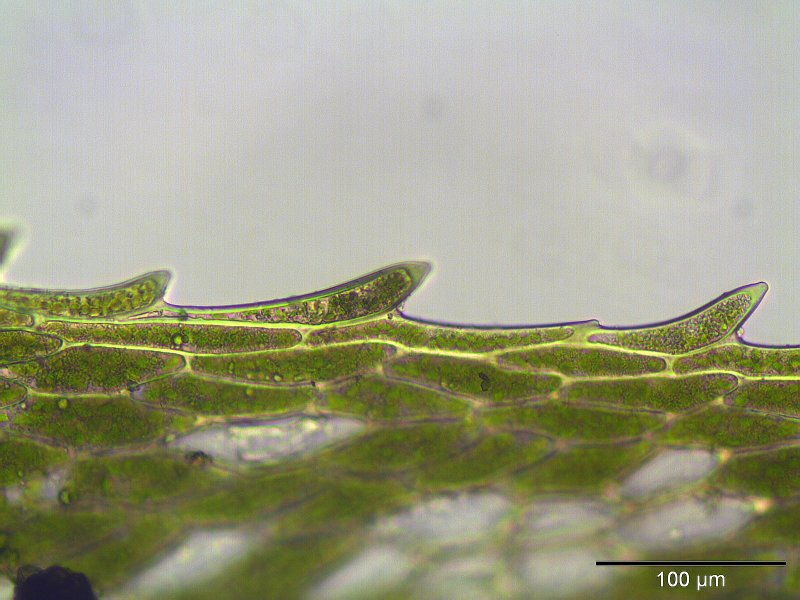 Rosenmoos (Rhodobryum roseum), Blattrand, Vergrößerung: 250x